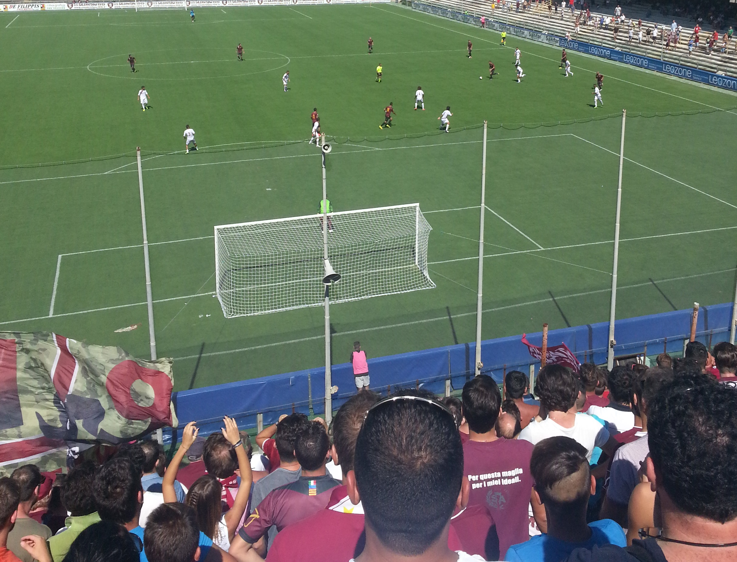 Salernitana - Aversa Normanna del 14/09/2014